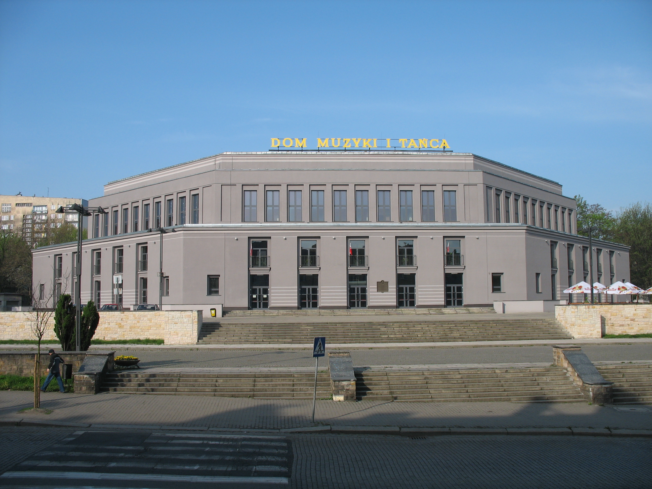 Dom Muzyki i Tańca, Zabrze